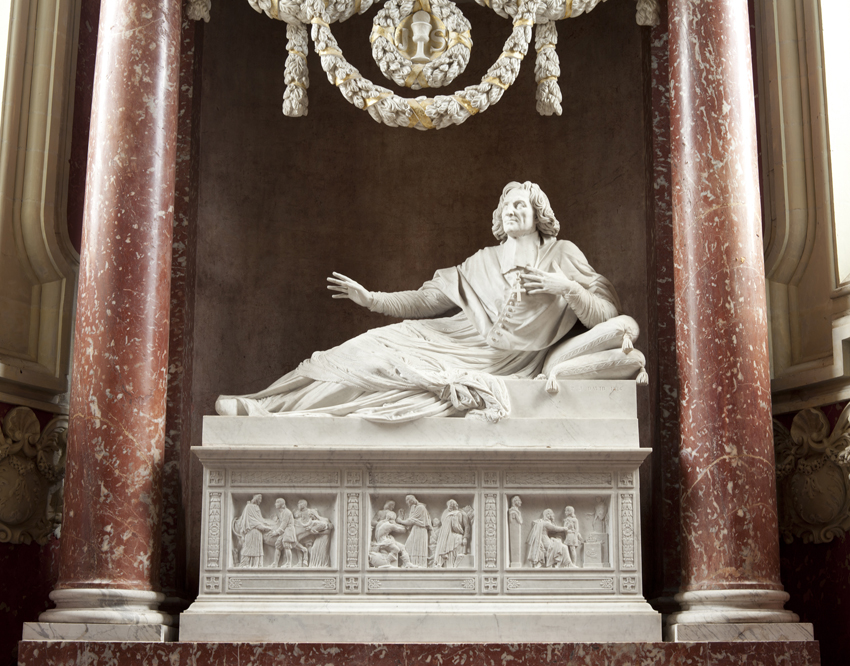 le monument funéraire à Fénelon, œuvre de David d'Angers, 1826 .